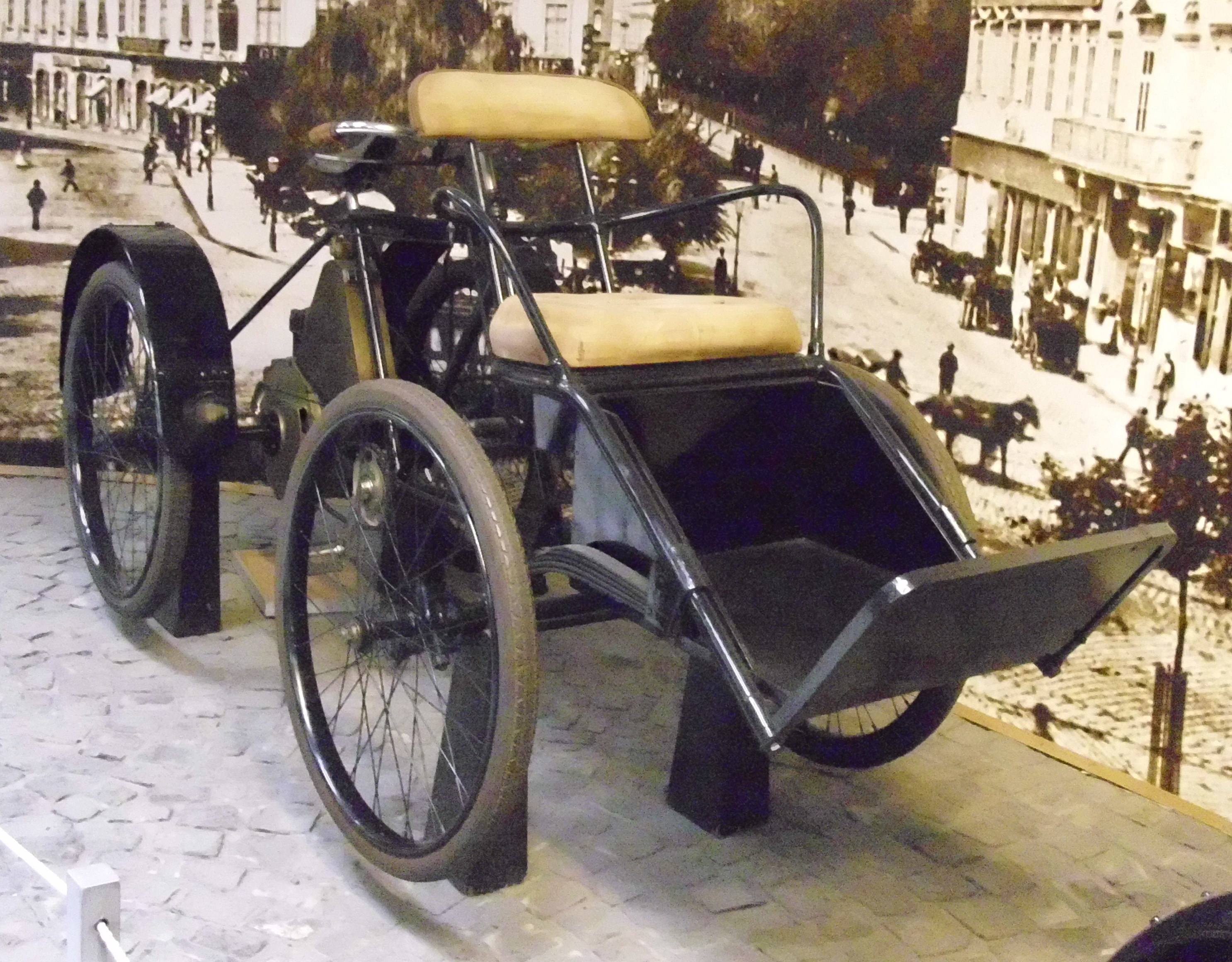 Aurore Quadricycle 1902 im Transportmuseum Budapest